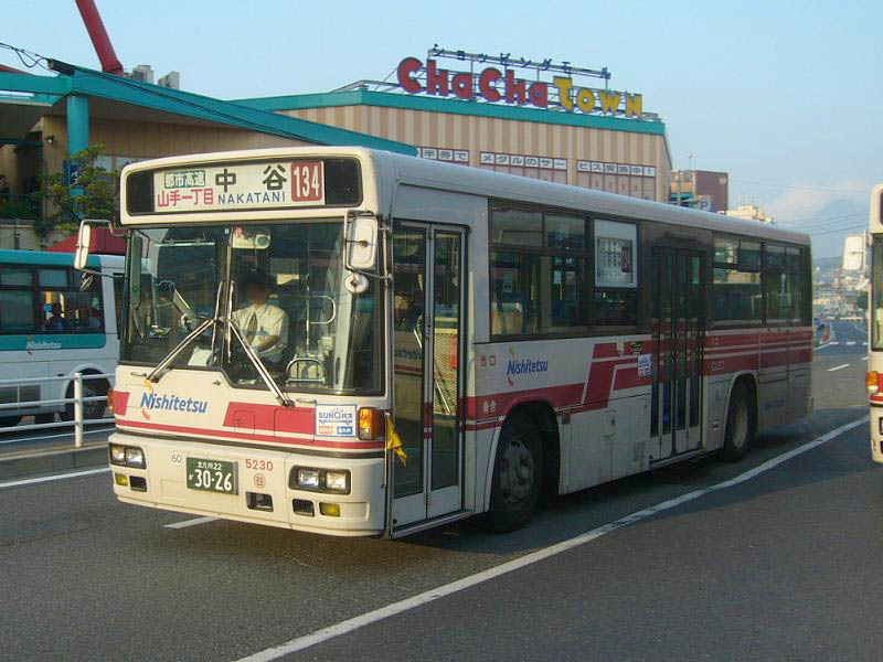 登録番号 北九州22か3026 西鉄バス北九州中谷自動車営業所所属（ＬＥＤ改造） 車番5230 2007年7月26日 砂津バス停にて撮影